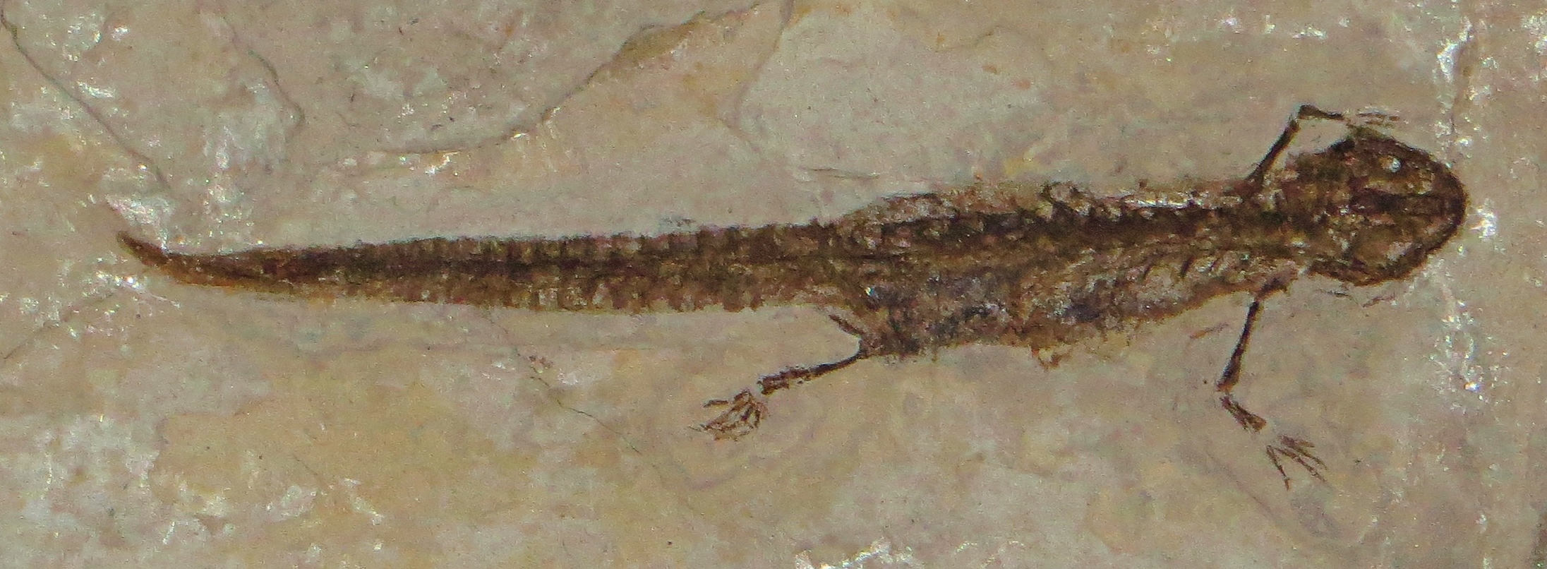 Fossil of Chelotriton - Took the picture at Museo di Storia Naturale, Milano